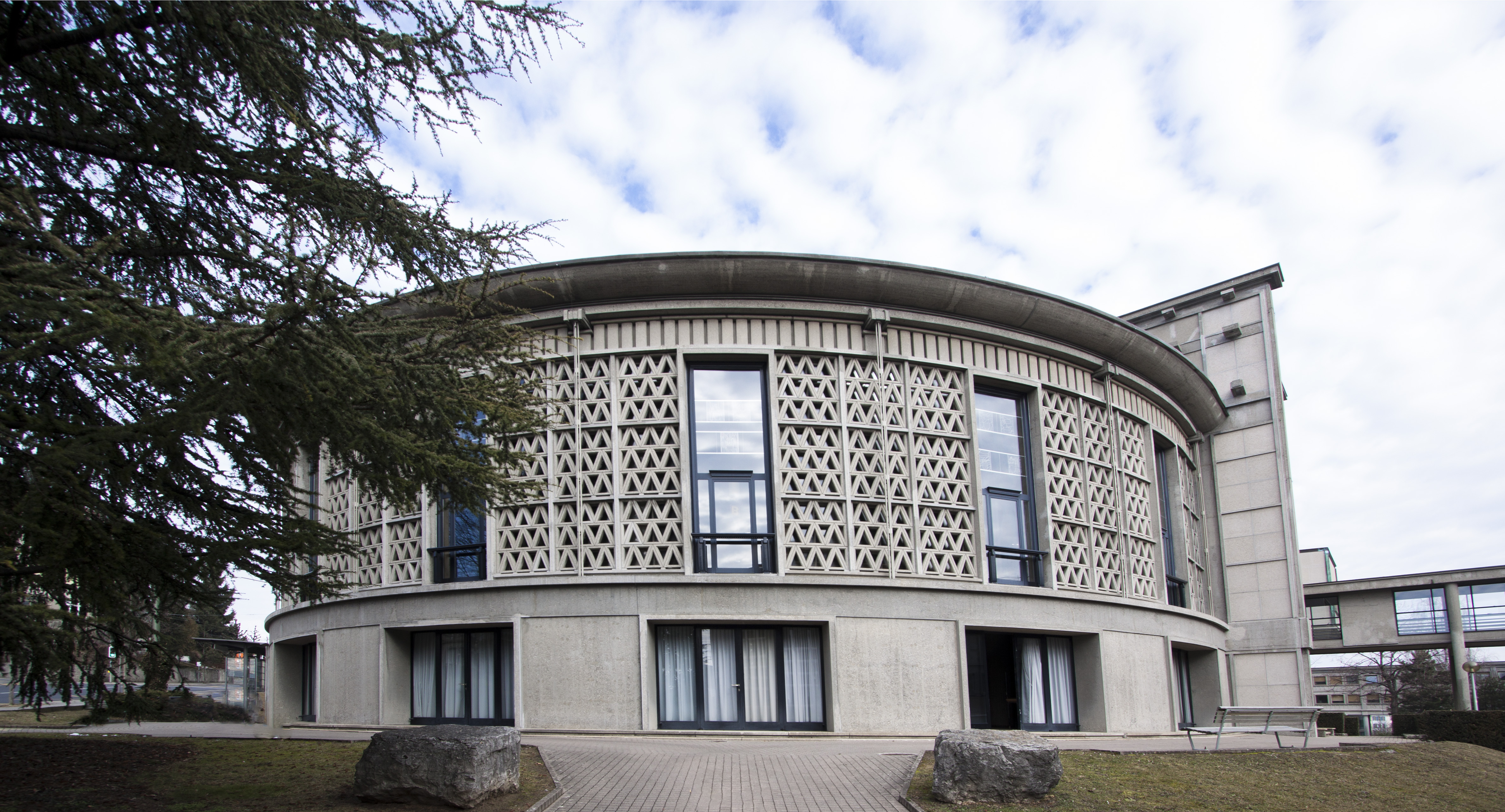 Aula Uni Freiburg